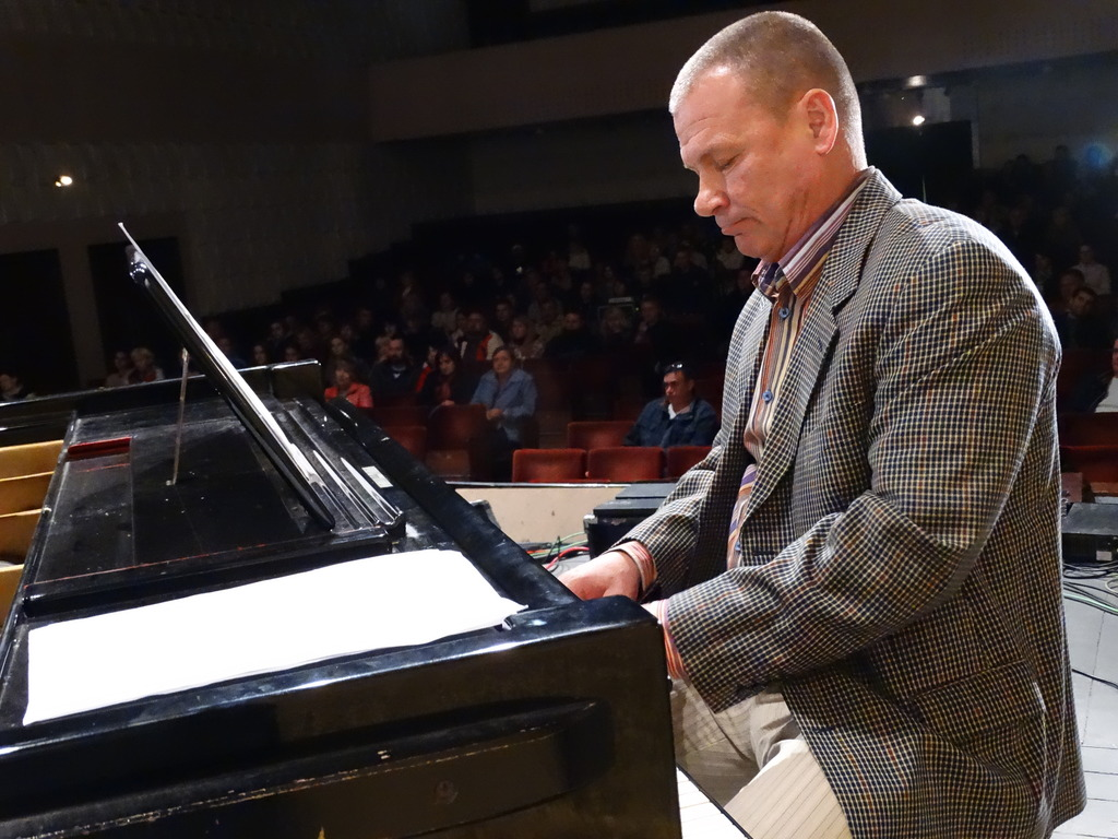 Руководитель квинтета, фортепиано.